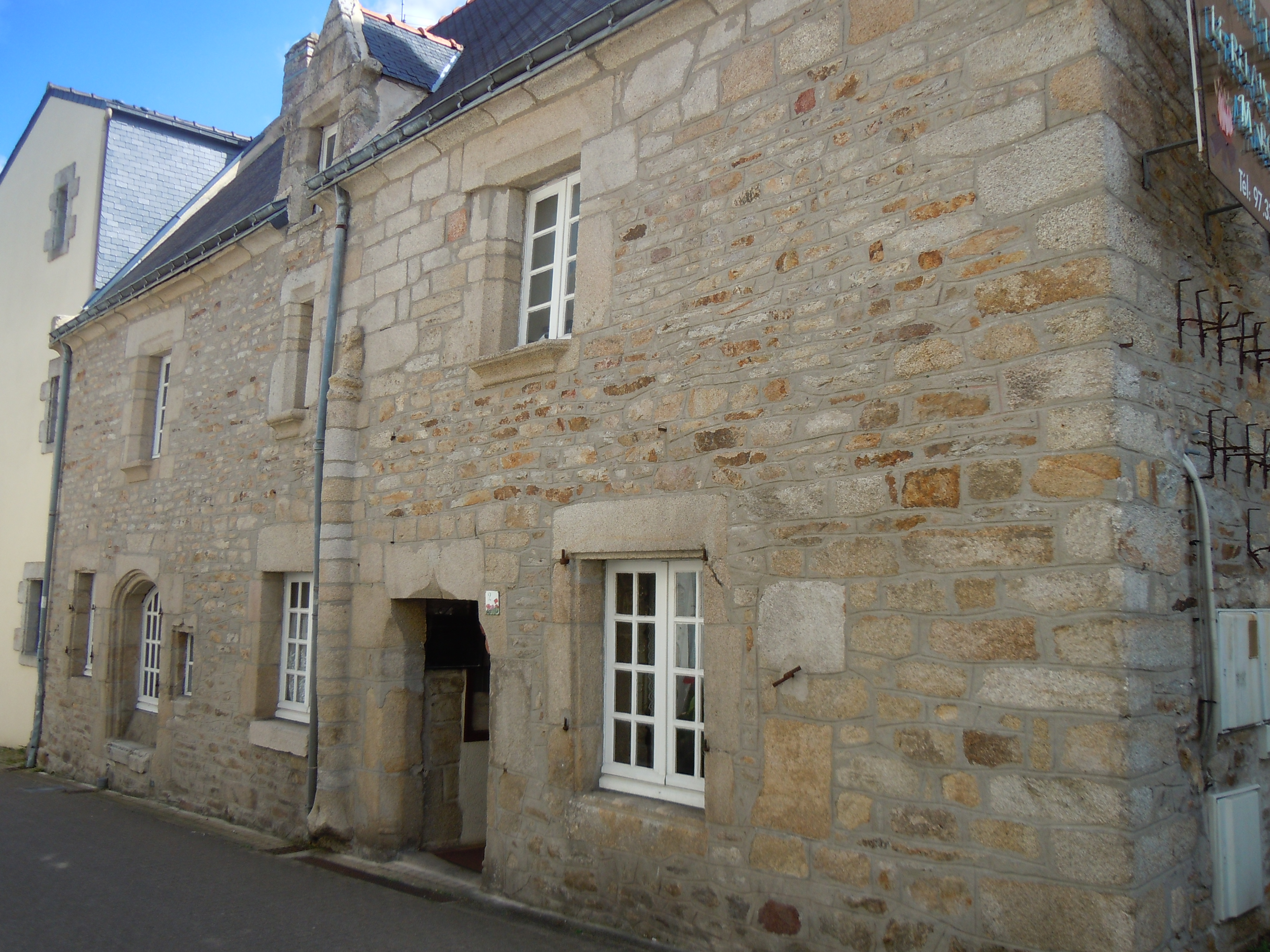 la maison dite du Marquis à Plouay (Morbihan), ancien siège de la juridiction du seigneur de Pontcallec